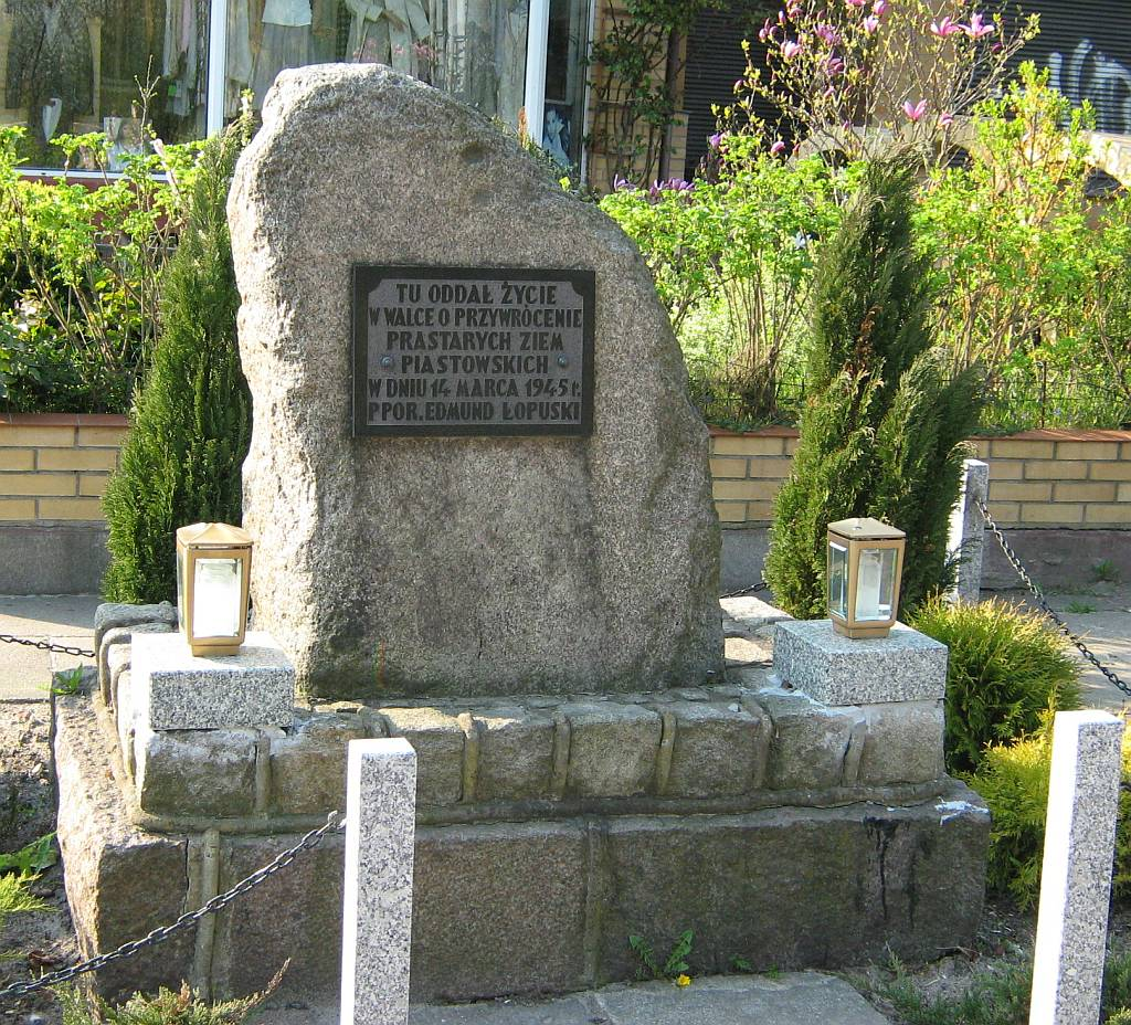 Pomnik upamiętniający miejsce śmierci podporucznika Edmunda Łopuskiego w Kołobrzegu, odsłonięty 3 czerwca 1972 r. przy ulicy jego imienia.